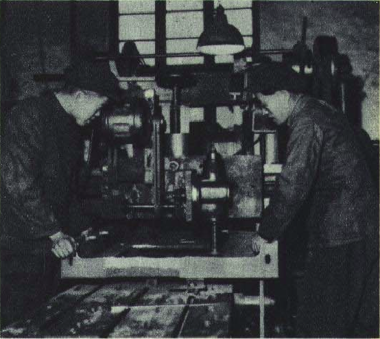 195112 全国劳模钱嘉光